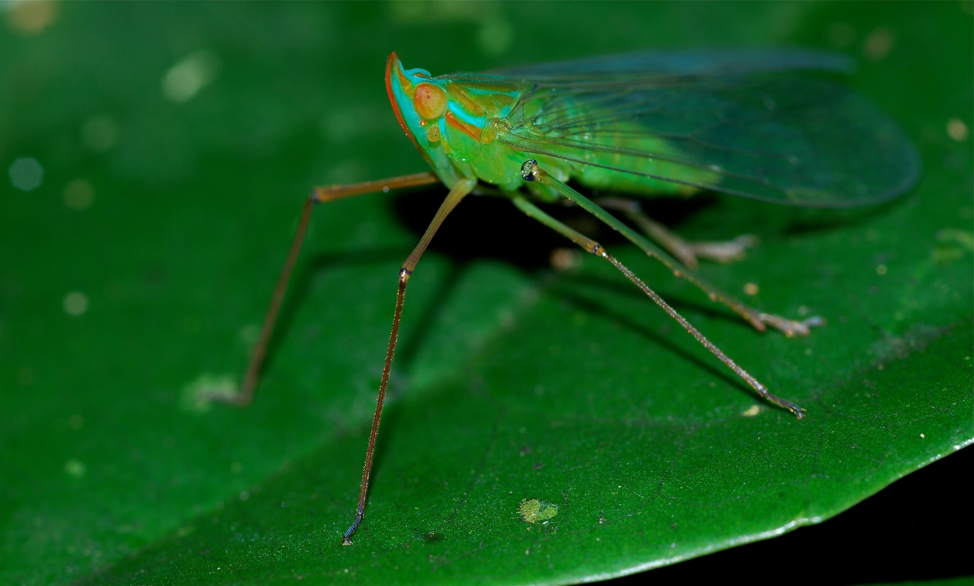 Taman Negara NP, Pahang, MALAYSIA